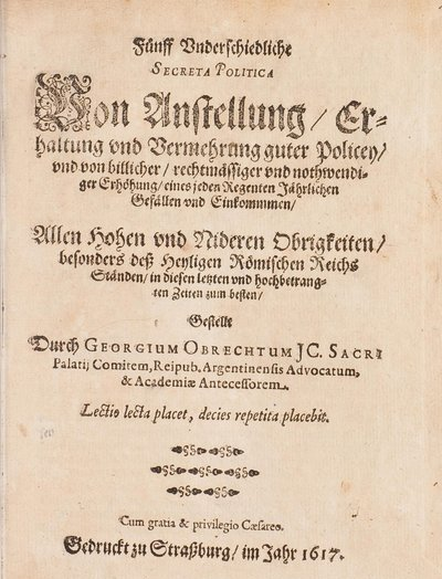 Obrecht, Georg: Fünff Vnderschiedliche Secreta Politica. Straßburg, 1617